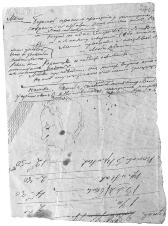 Рисунки и рукописный текст Ф.М. Достоевского. "Братья Карамазовы"